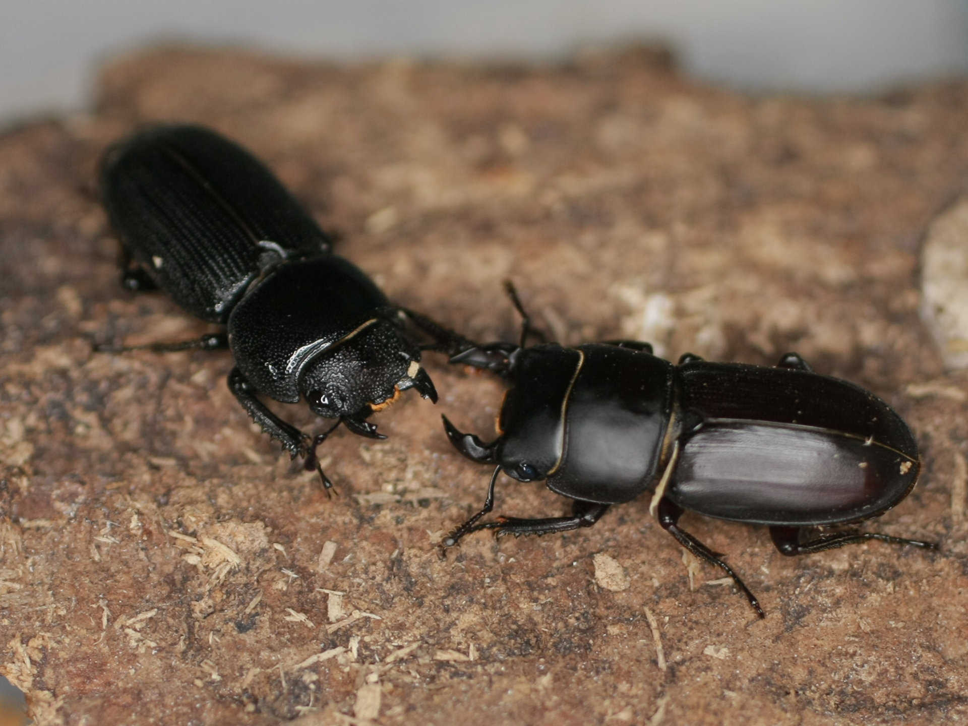 飼育中のムシモンオオクワガタの雌雄。オスの大アゴには上下に二重の内歯があり、眼上突起もある。メスの眼上突起は中央に一つだけである。